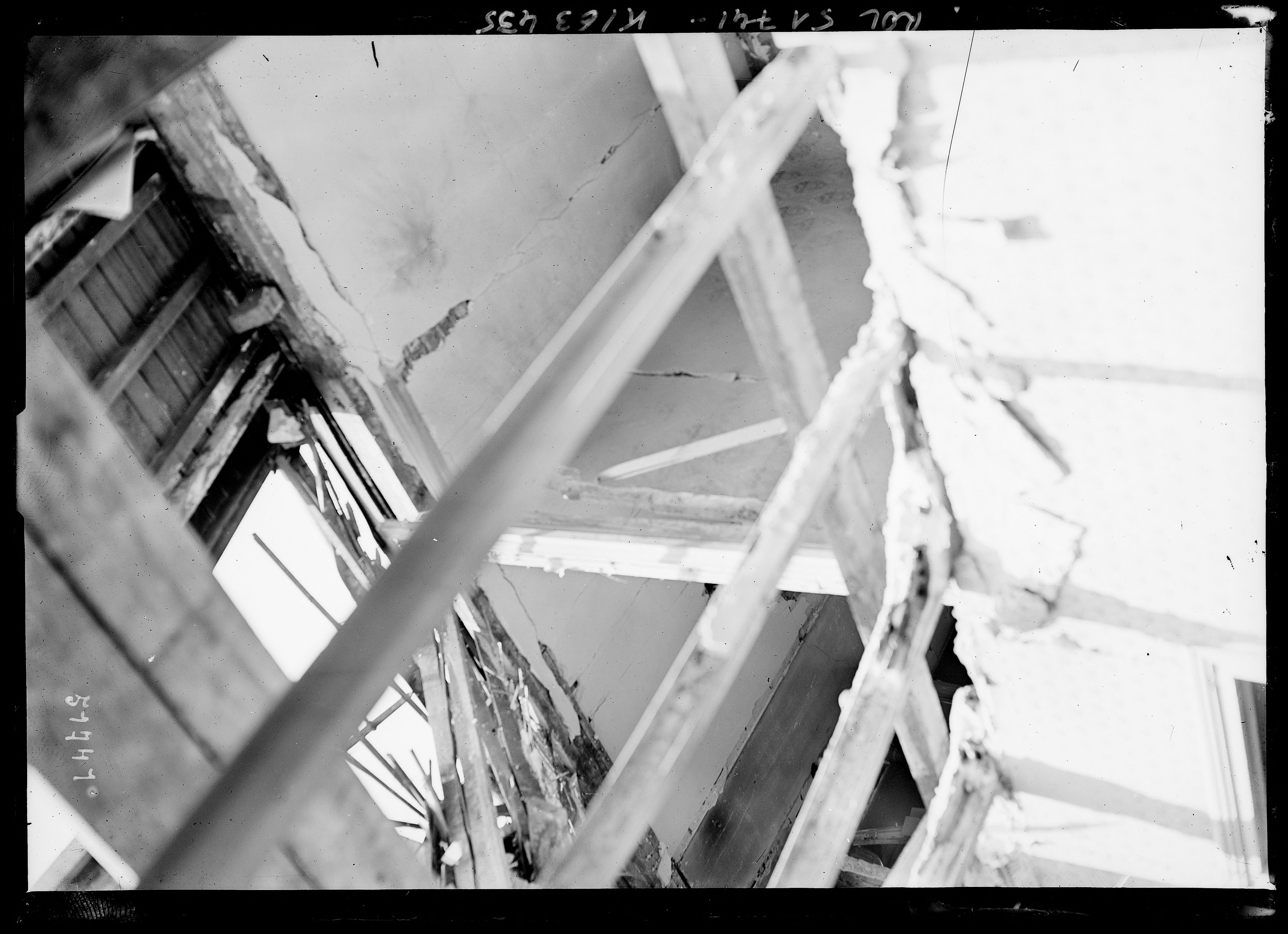 Dégâts dus aux bombardements par la Grosse Bertha du 29 mai 1918